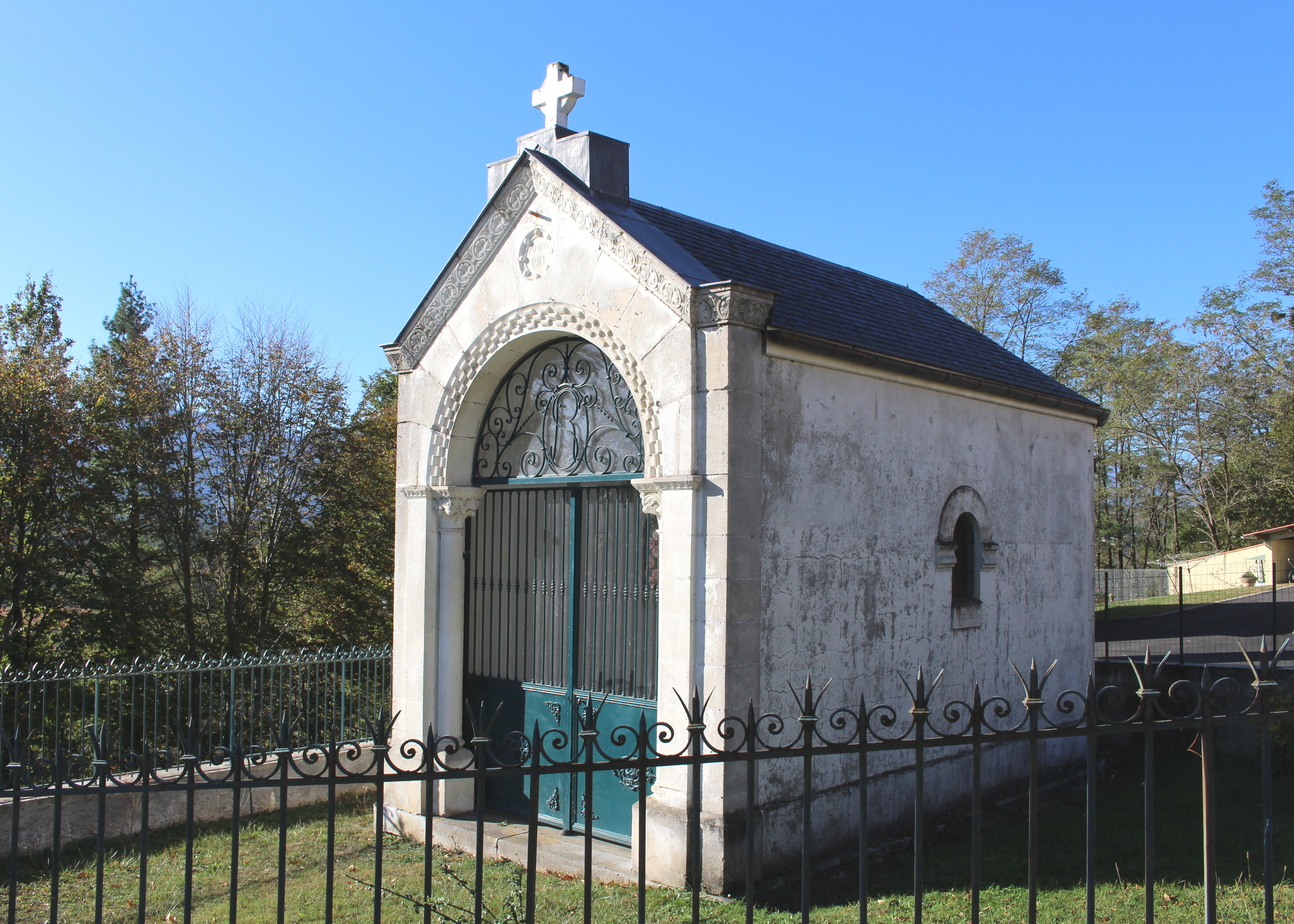 Chapelle Saint-Roch de Tuzaguet (Hautes-Pyrénées)